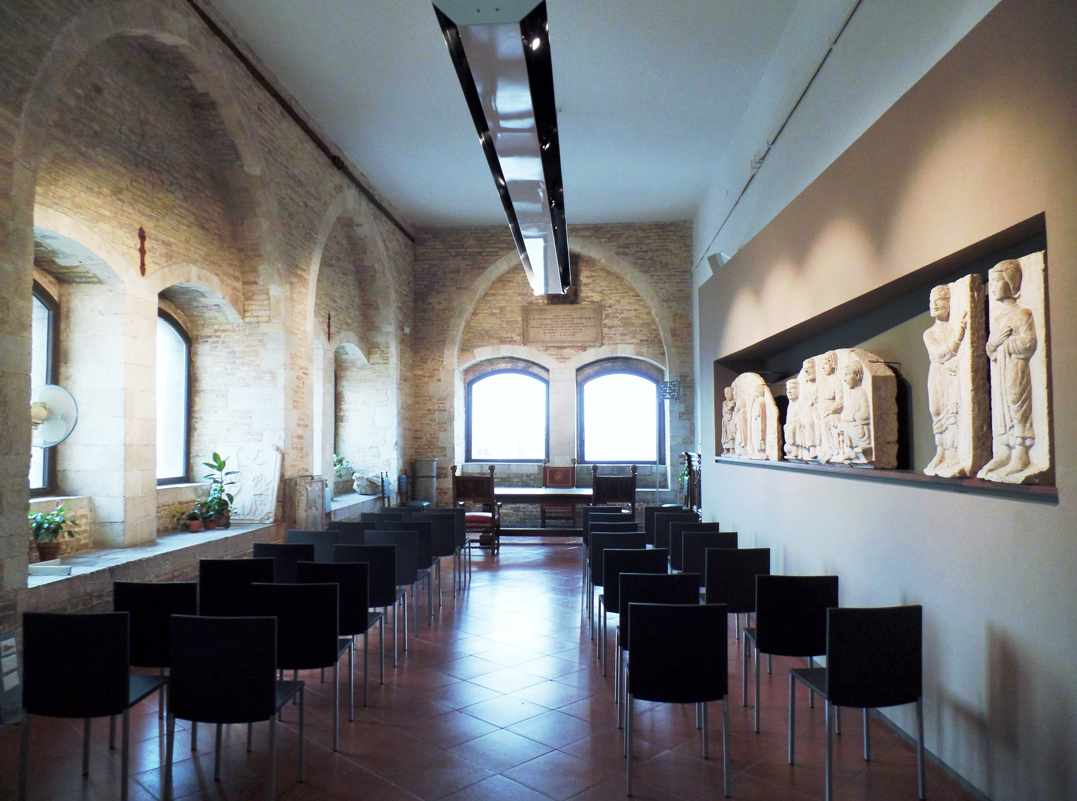 Palazzo degli Anziani Ancona sala per matrimoni civili This is a photo of a monument which is part of cultural heritage of Italy.